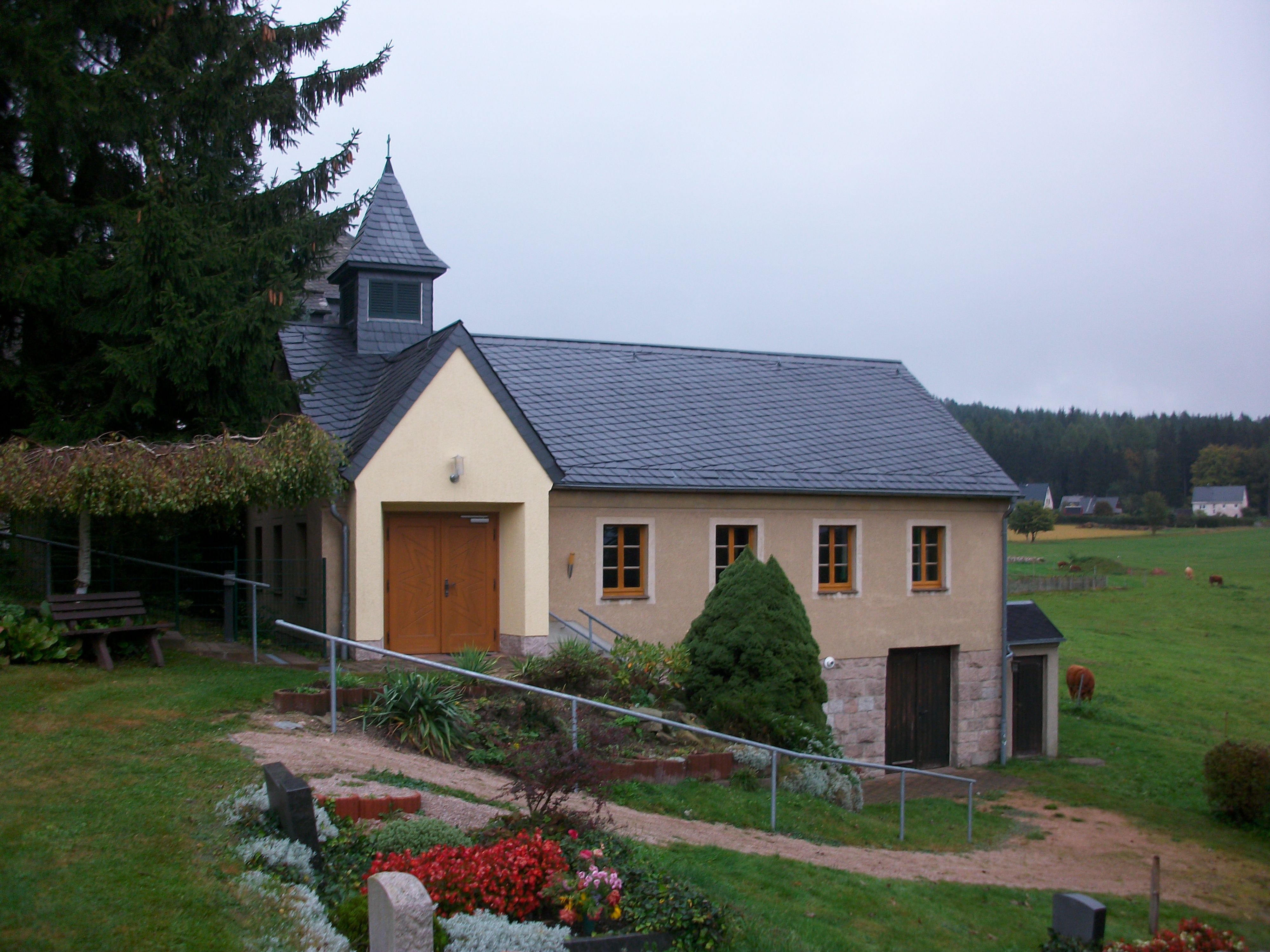 Burkhardtsgrün_ev.-luth. Kirche (2016)